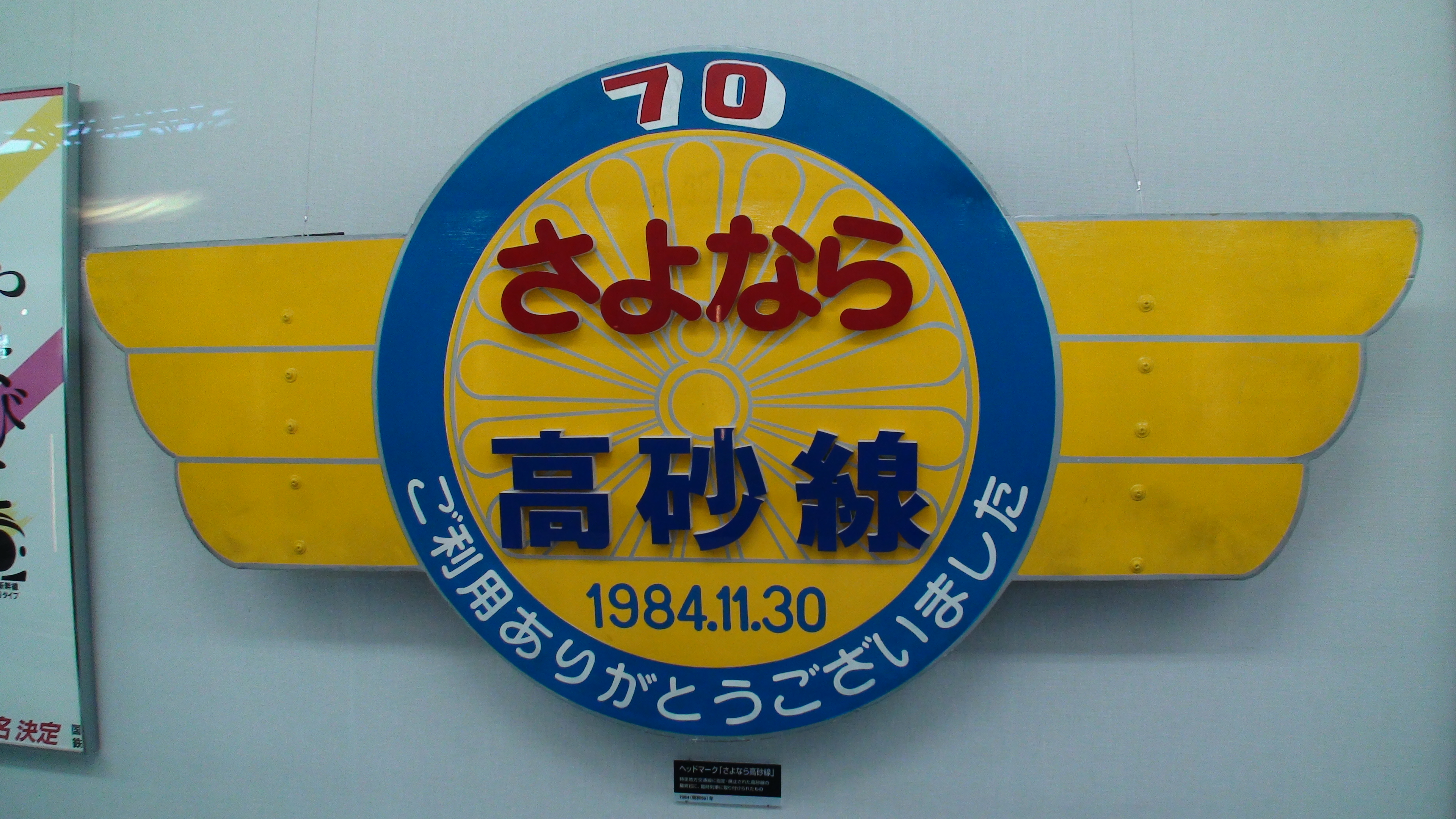 高砂線 廃止時のヘッドマーク （鉄道博物館）